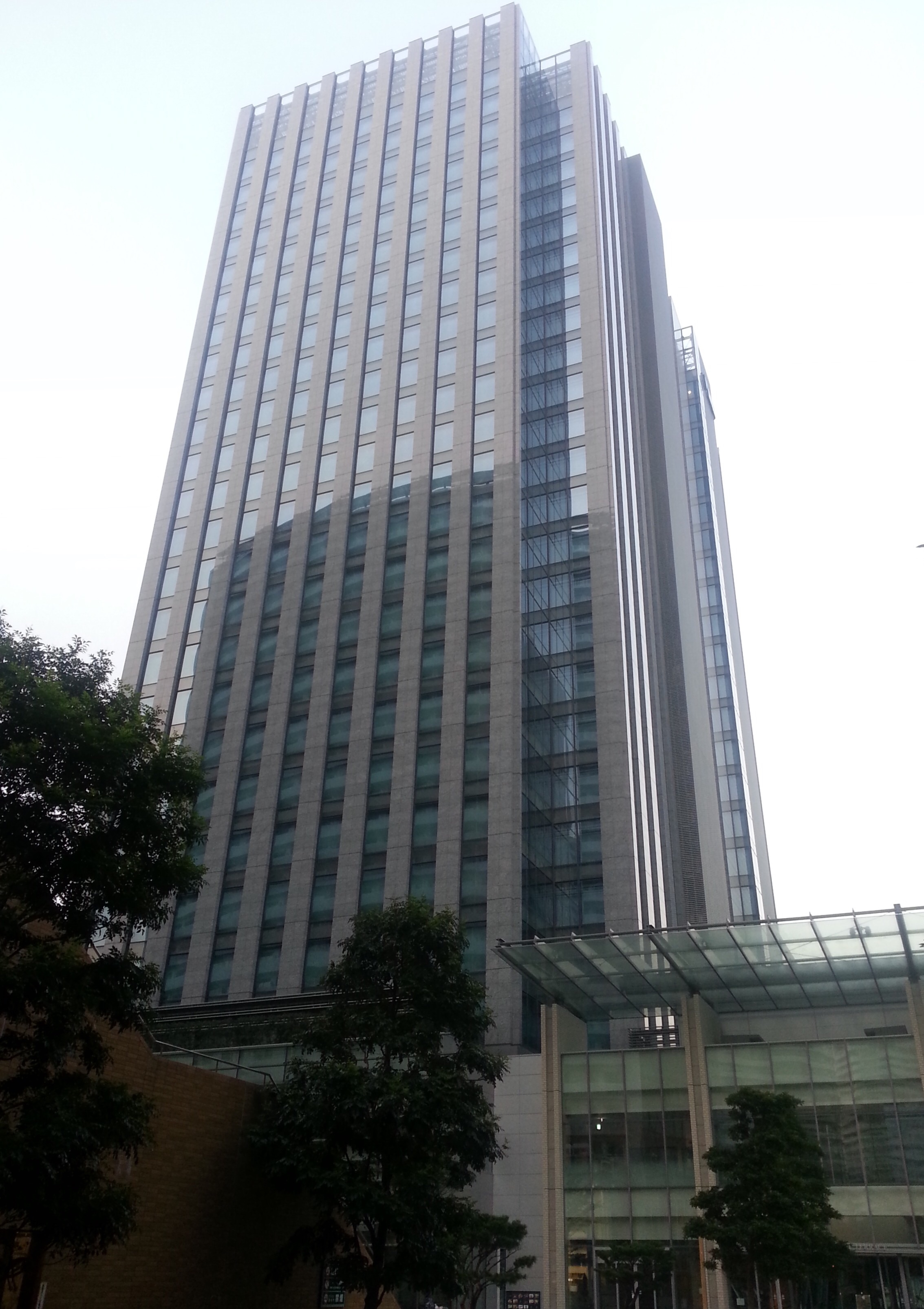 みなとみらいグランドセントラルタワー（東側〈グランモール公園側〉より撮影）。